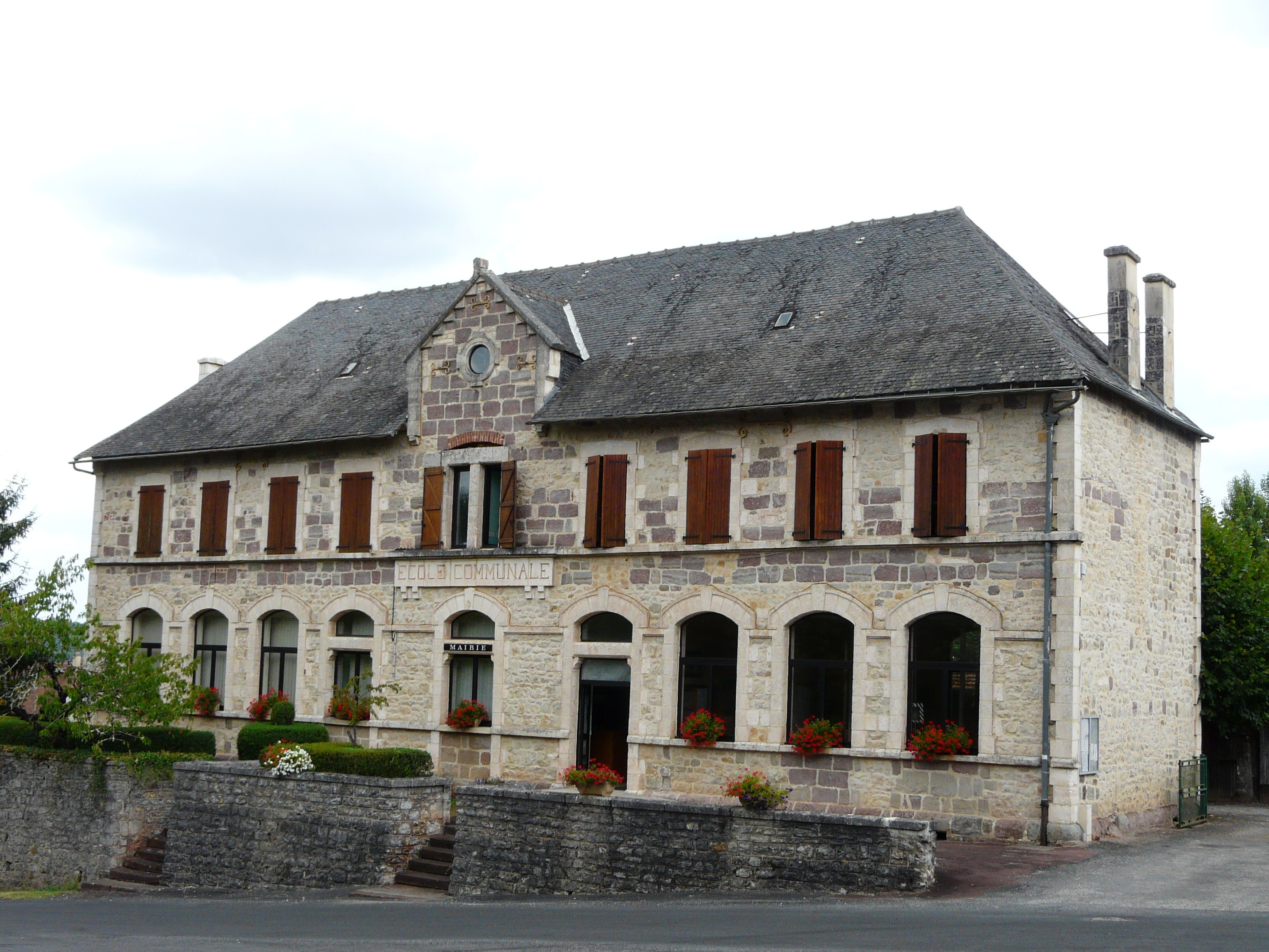 Le bâtiment de la mairie et de l'école, Mansac, Corrèze, France.